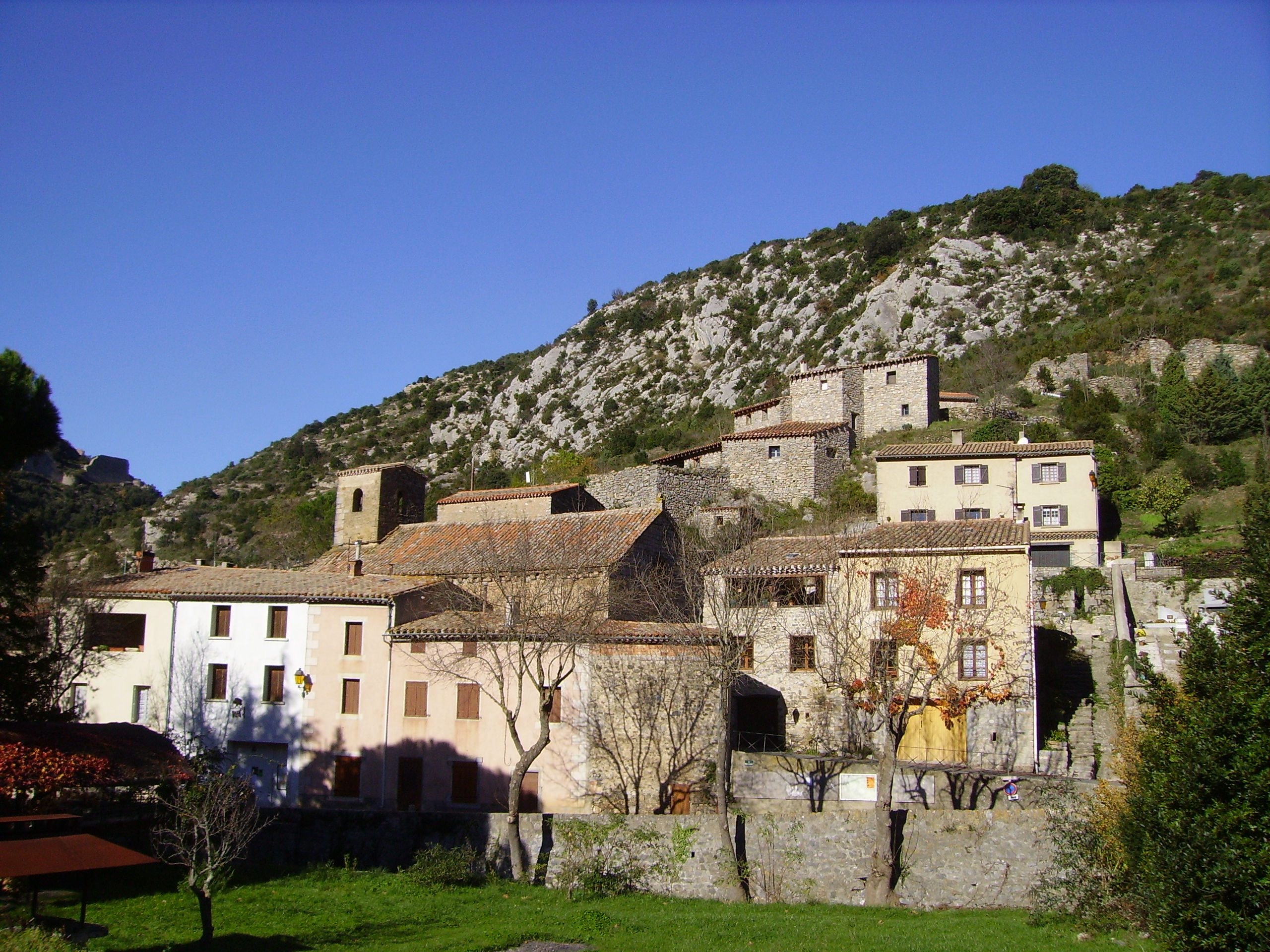 Vue sur le village de Termes (Aude), blotti à flanc de colline, sur la rive gauche du Sou.